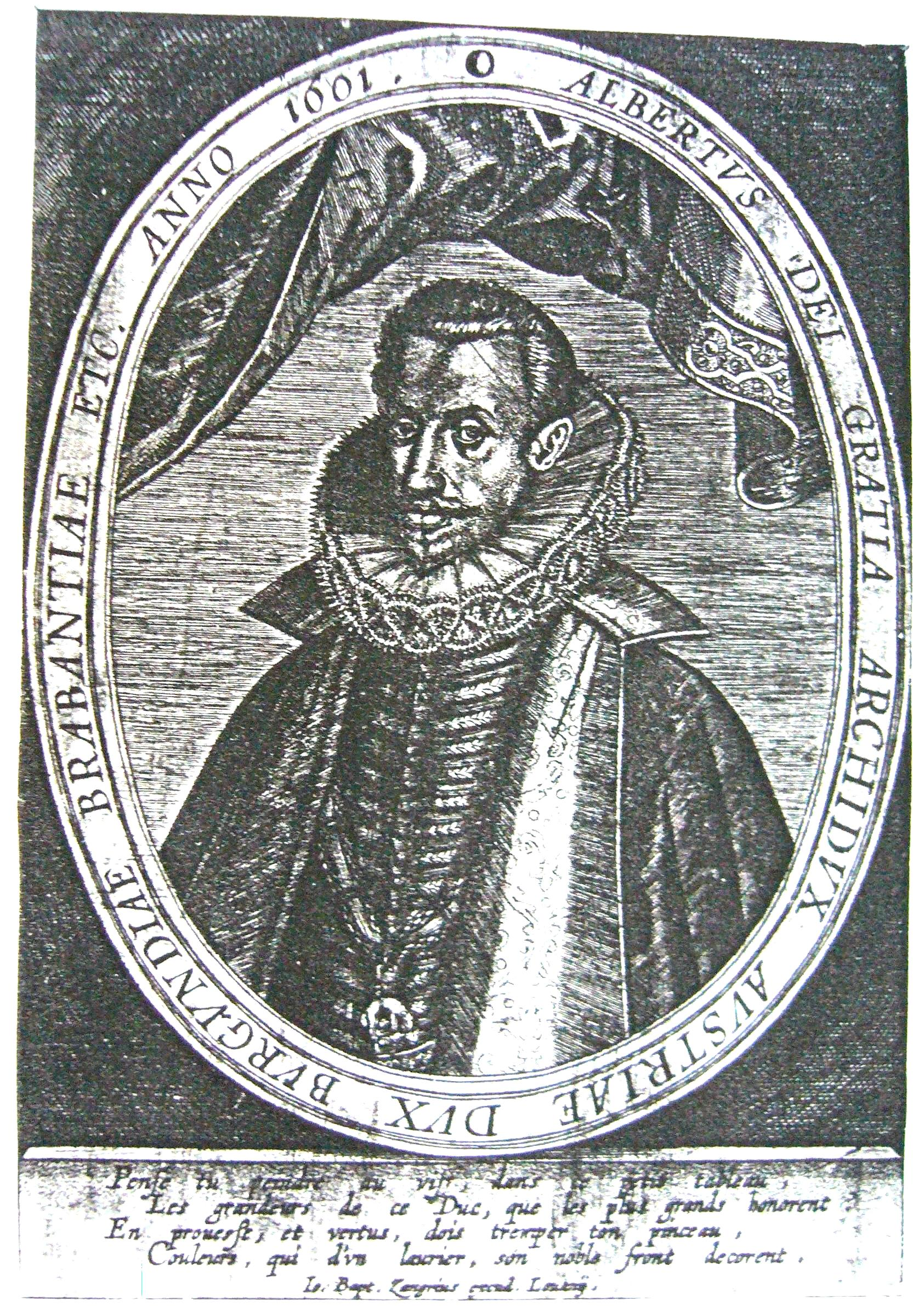 Habsburg Albert